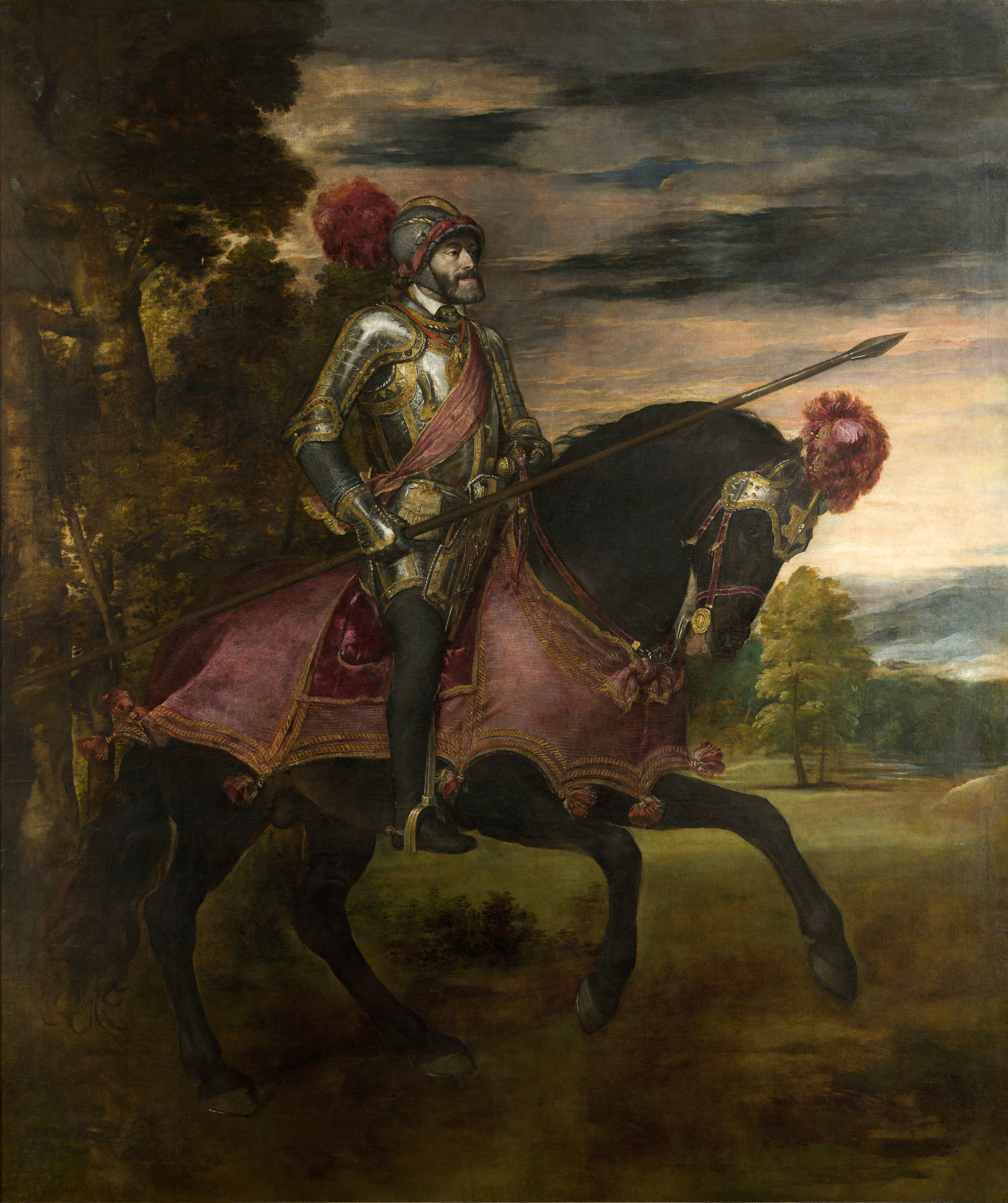 Retrato ecuestre del emperador Carlos I de España (1500-1558), que aparece llevando la armadura que usó en la batalla de Mühlberg, que se libró en 1547 y en la que el emperador derrotó aplastantemente a los protestantes alemanes.